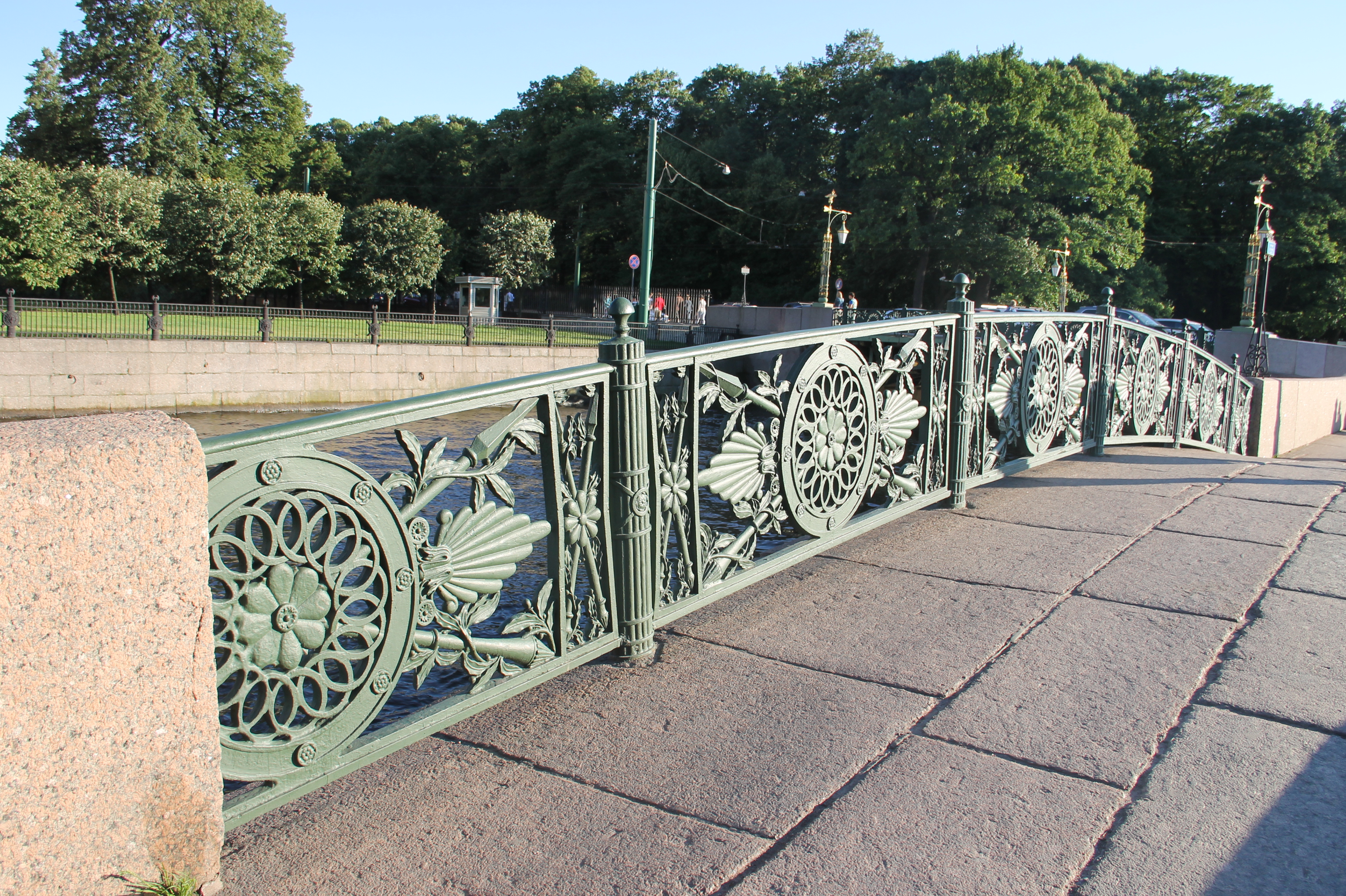 Перильное ограждение Нижне-Лебяжьего моста через Лебяжью канавку, Санкт-Петербург.